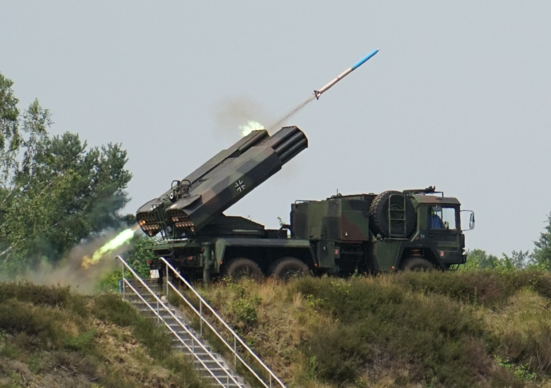 LARS beim Schuss (2018)